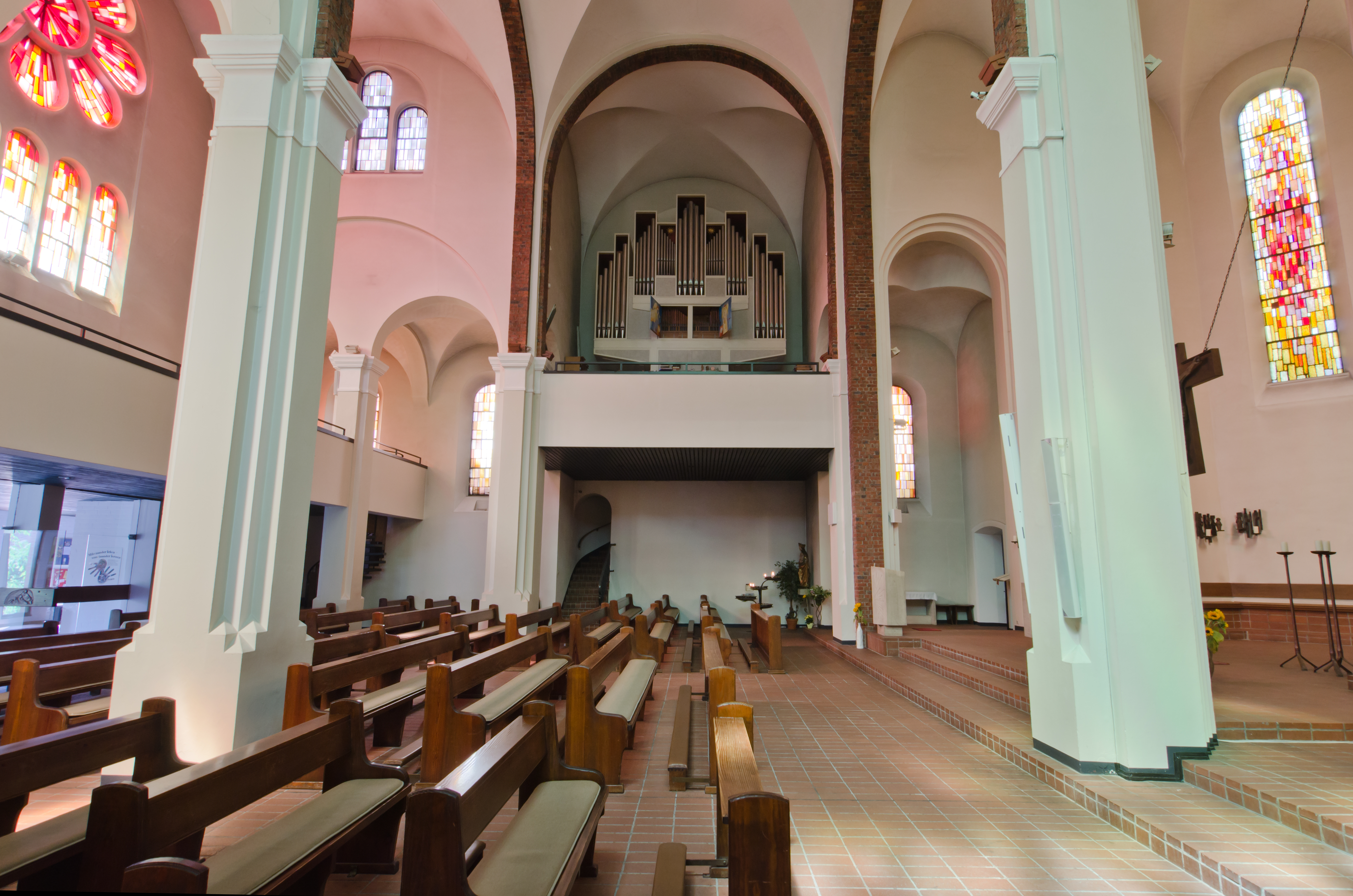 St. Joseph Wandsbek Innenraum